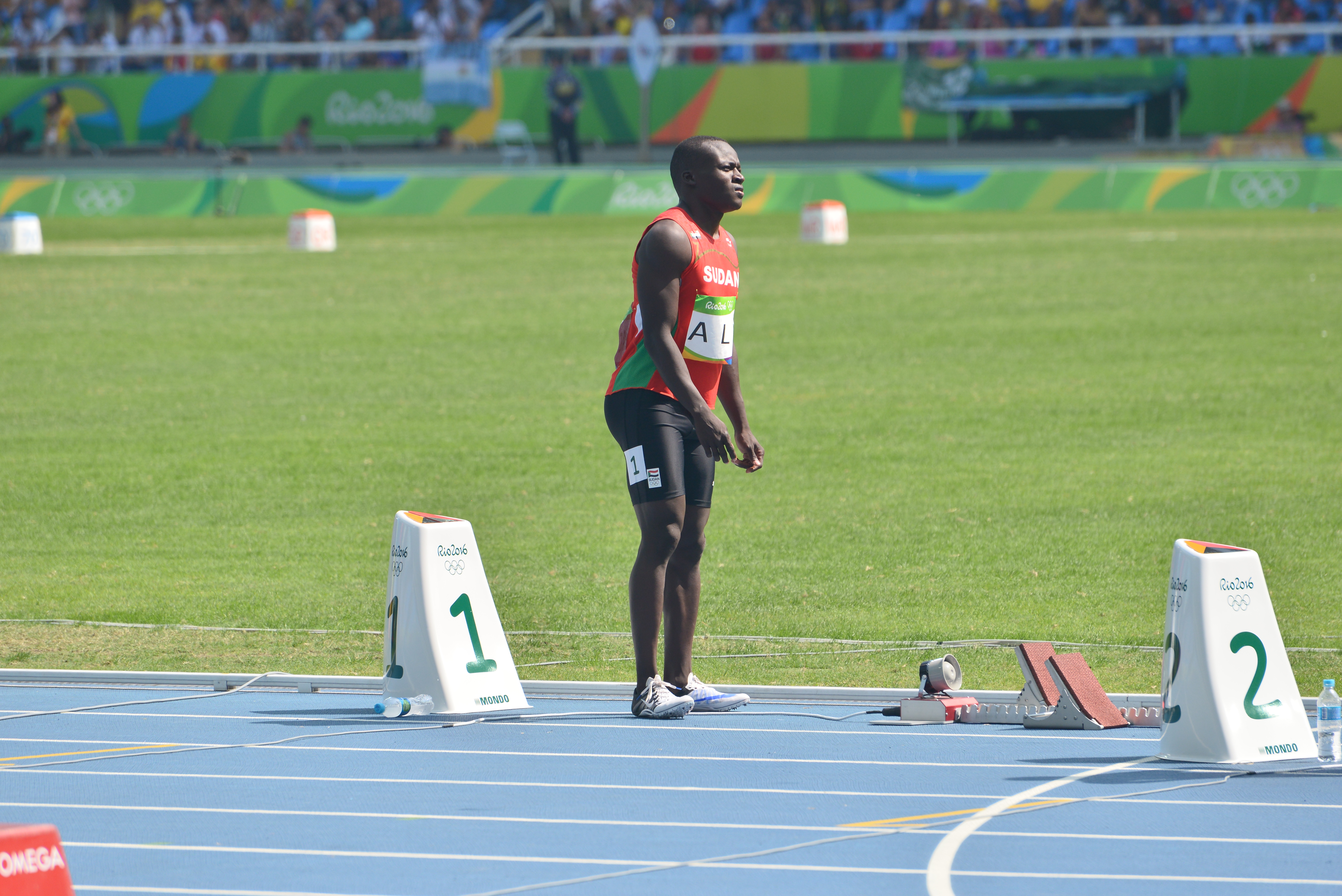 Séries du 200m Homme aux JO de Rio 2016